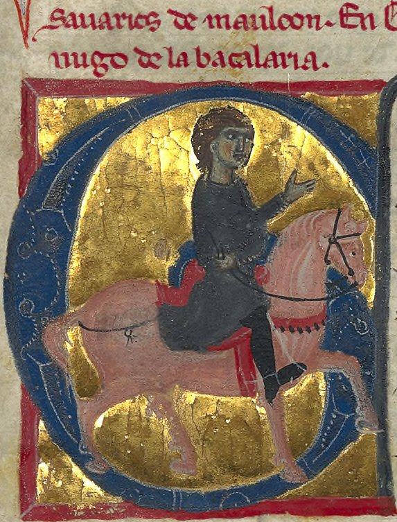 Savaric de Mauléon from BNF Français 12473